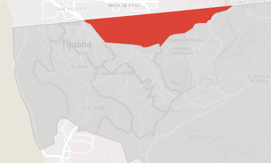 Mapa de la delegación Otay Centenario